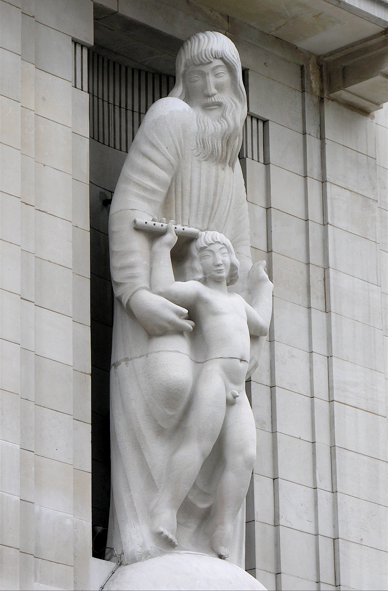 Gill's sculpture in more detail.